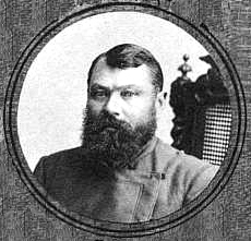 Varlaam Haritov, Russian peasant, a member of the Fourth Russian State Duma, 1913-1917